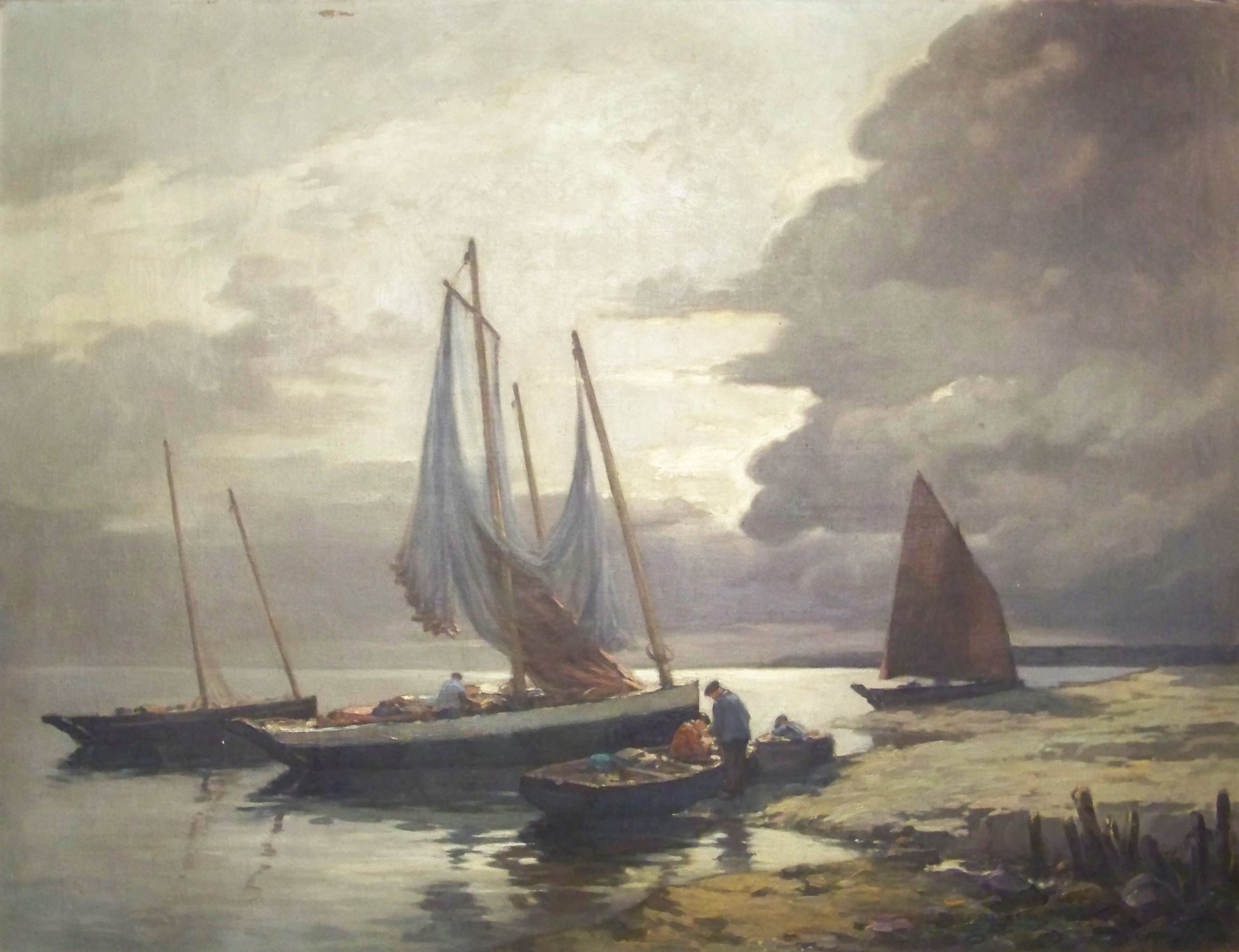 Marine